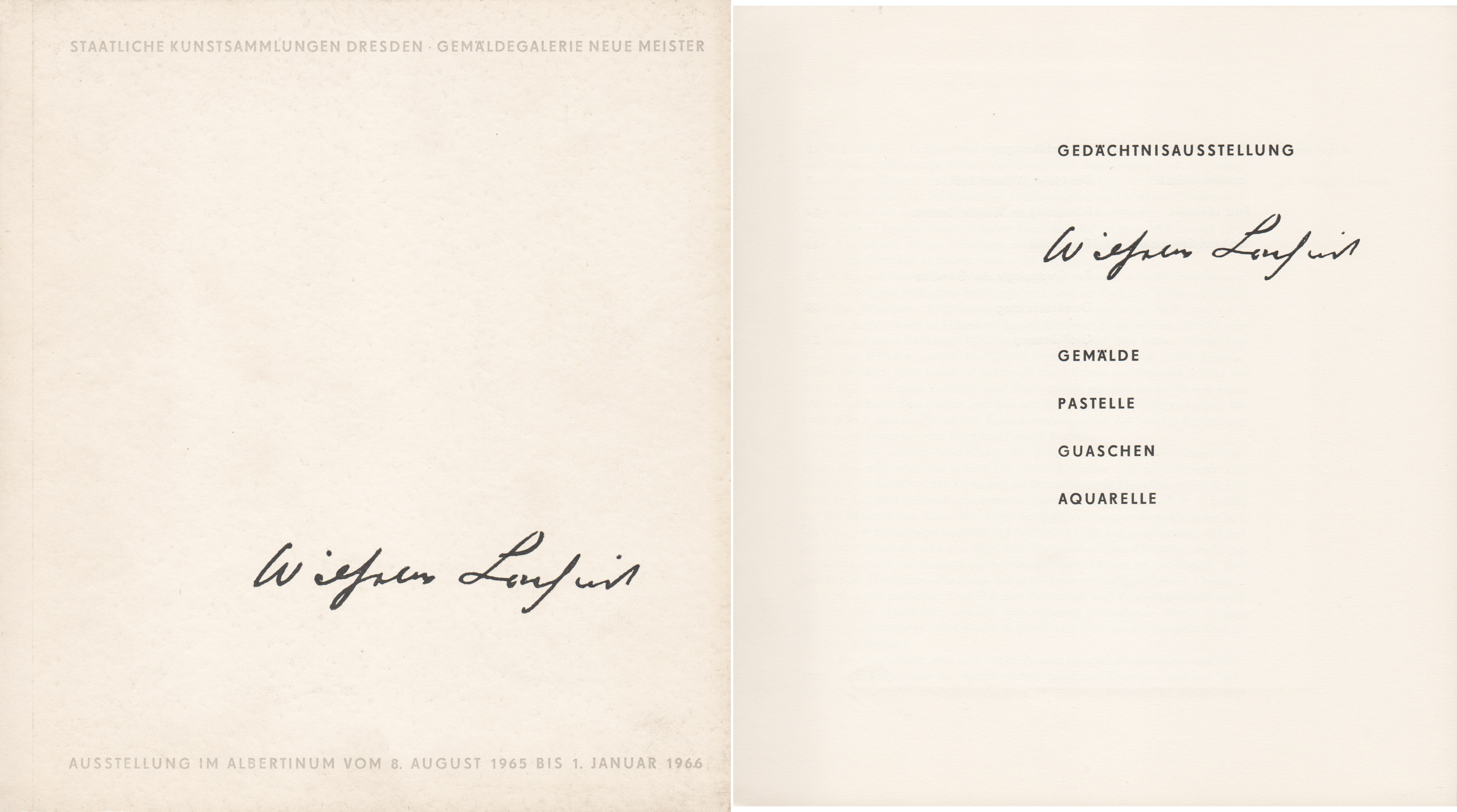 Das Informationsheft zur Gedächtnisausstellung enthält von verschiedenen Autoren Angaben zu seinem Leben und den Werken. Im Anhang sind Abbildungen von 22 seiner Werke enthalten. Der Herausgeber waren die Staatlichen Kunstsammlungen Dresden Gemäldegalerie Neue Meister 1965.